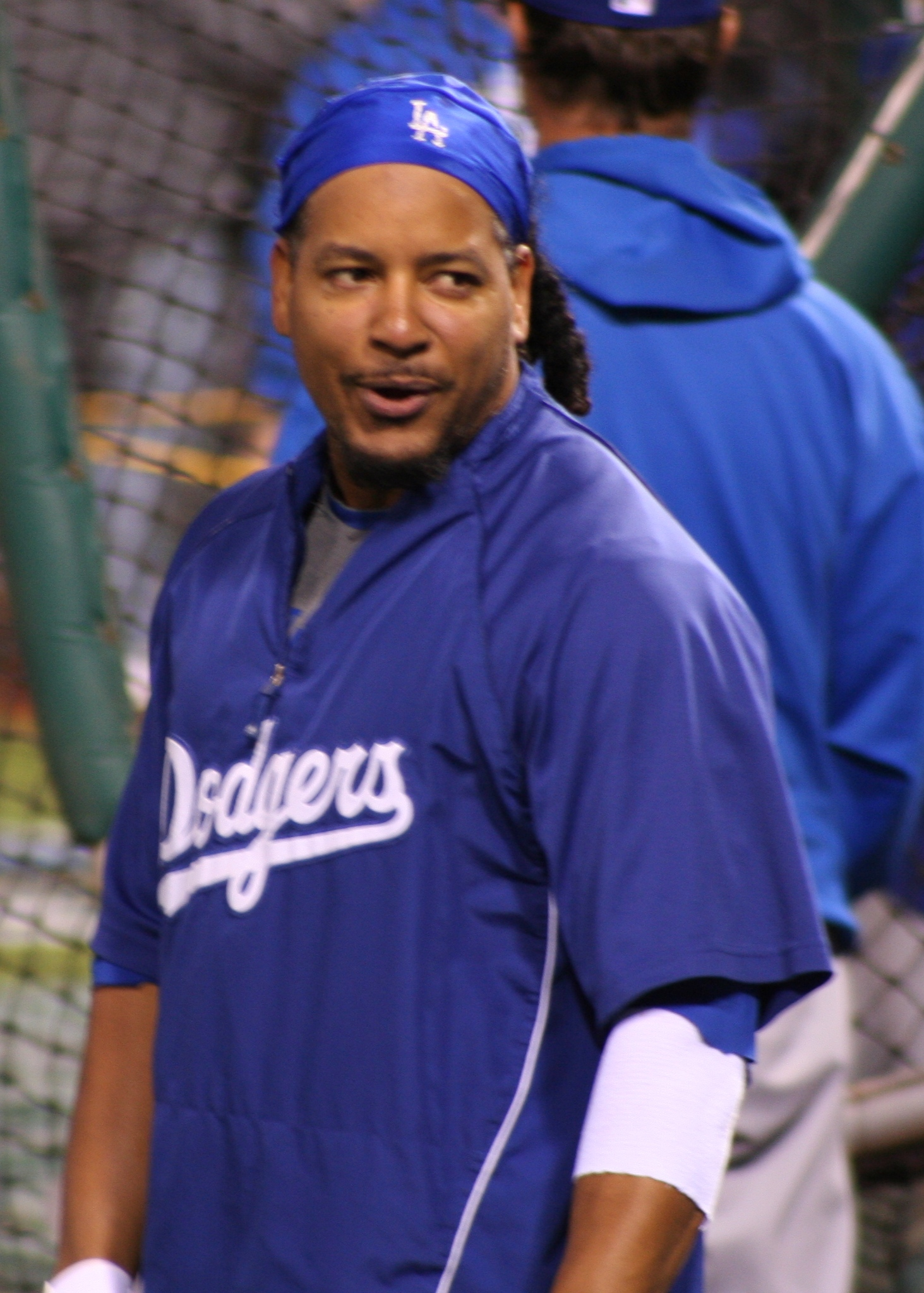 Manny Ramírez beisbolista de Grandes Ligas.